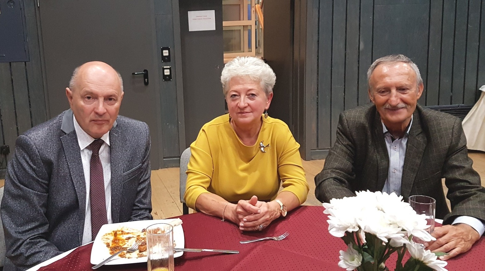 Gala 70-lecie PGE Spójni Stargard